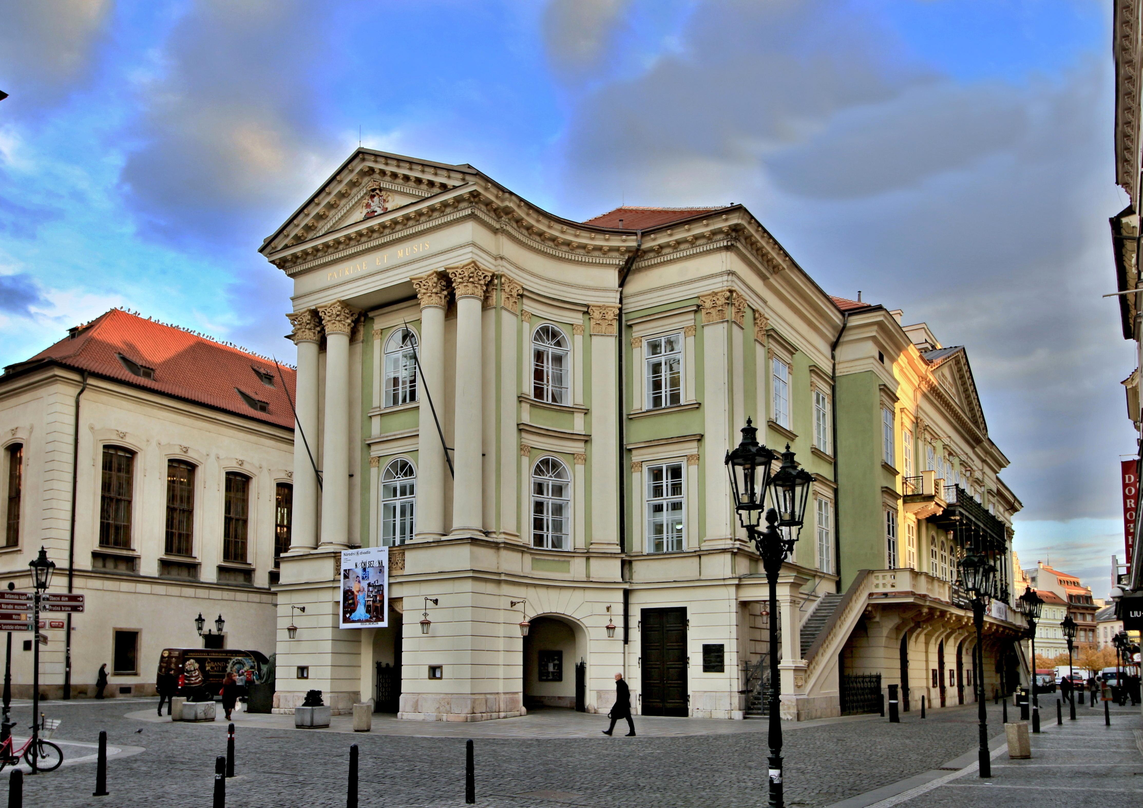 Stavovské divadlo v Praze